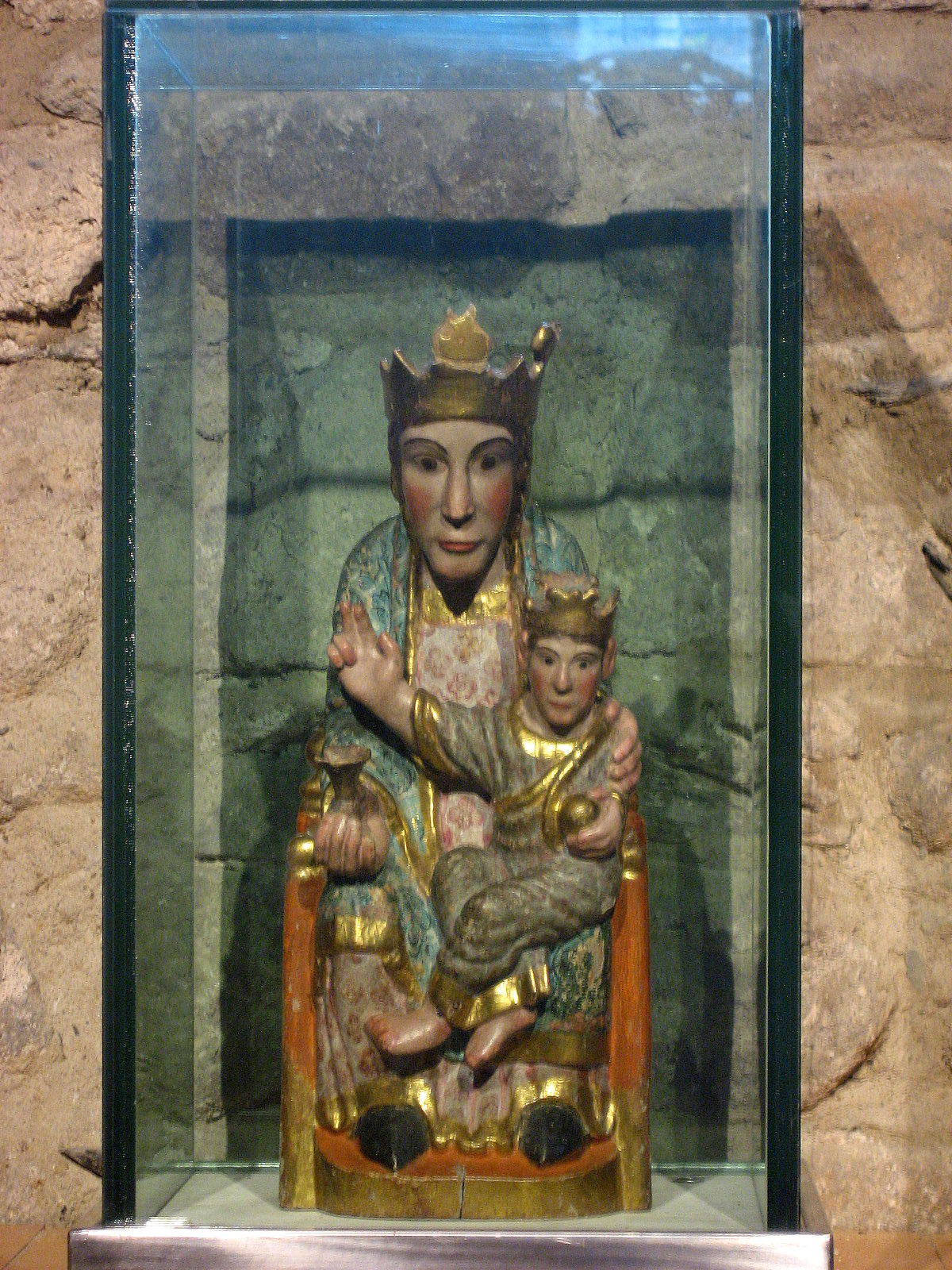 Santa Coloma Crist